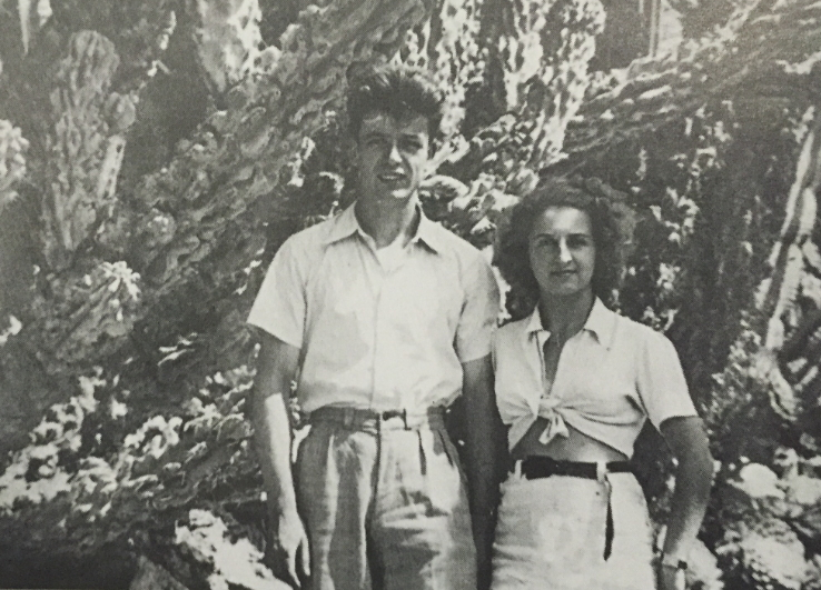 Photo